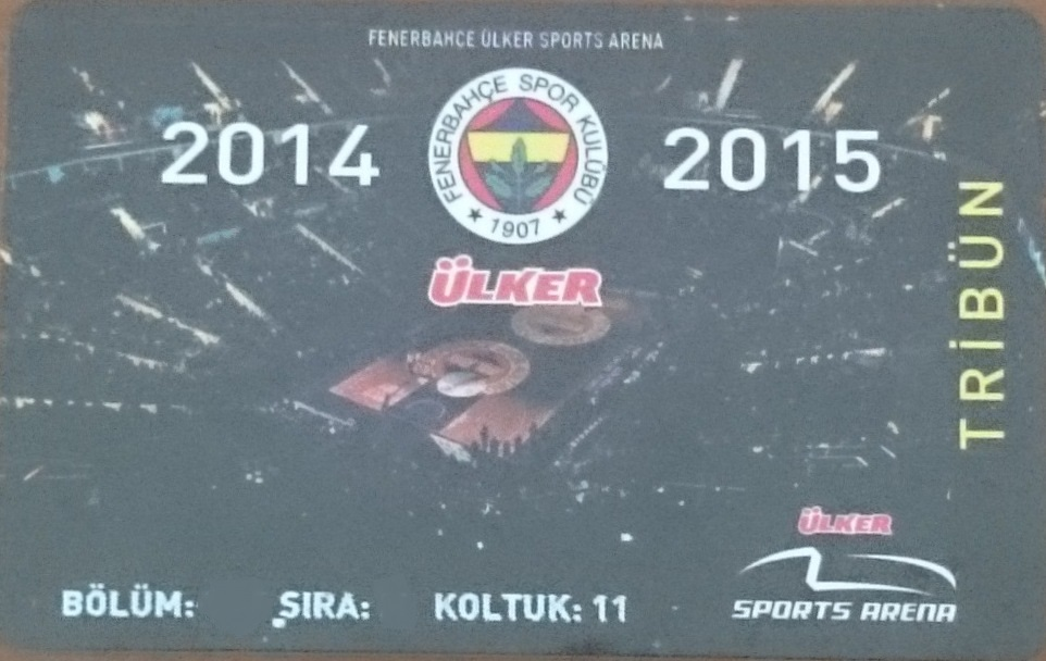 Fenerbahçe Ulker 2014-15 Season Ticket